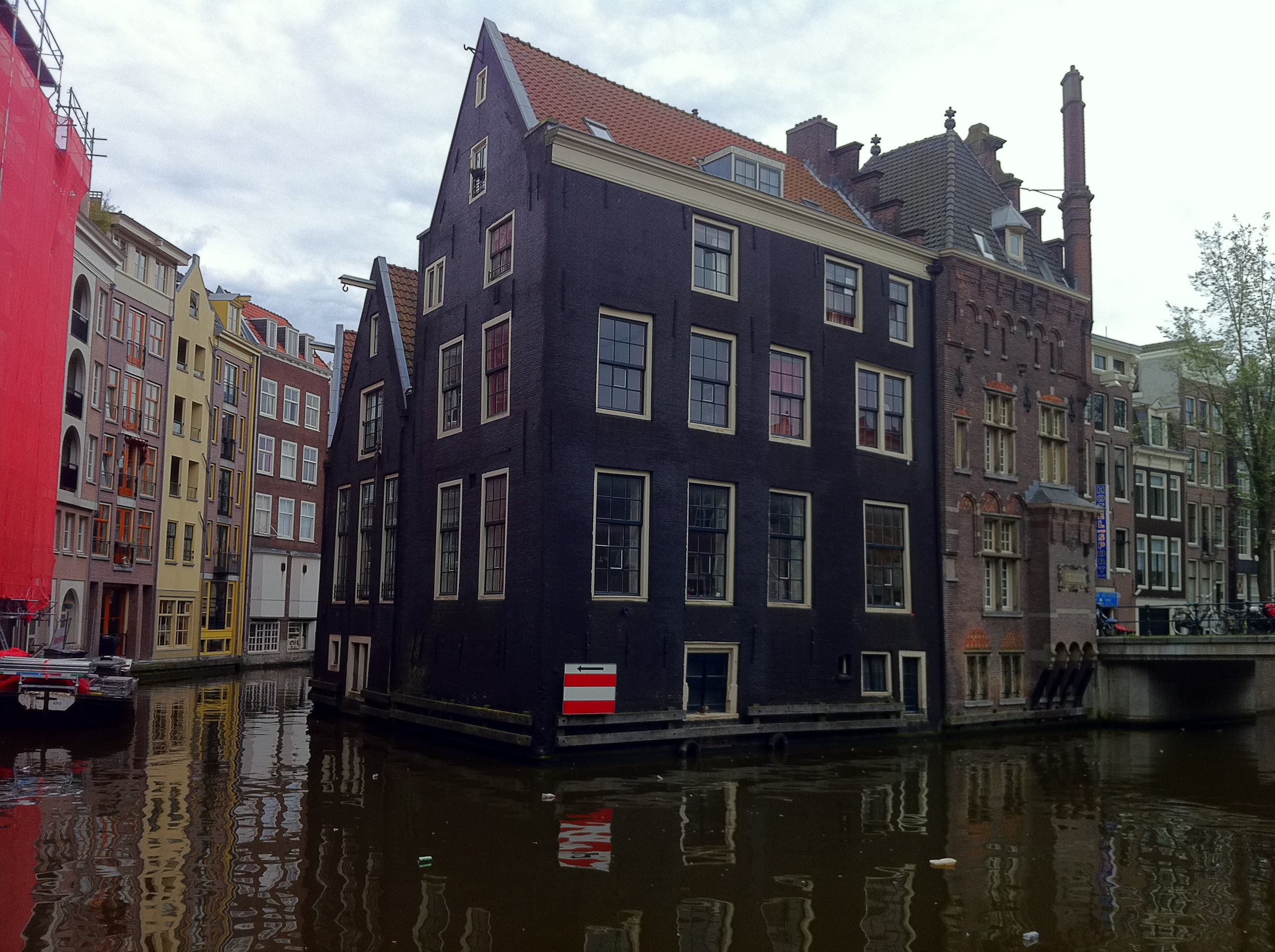 Huize Vredenburgh, Vredenburgersteeg 1 Amsterdam. Panden deels uit de 15e en 16e eeuw, aanbouw uit 1890 van architect A.C. Bleijs